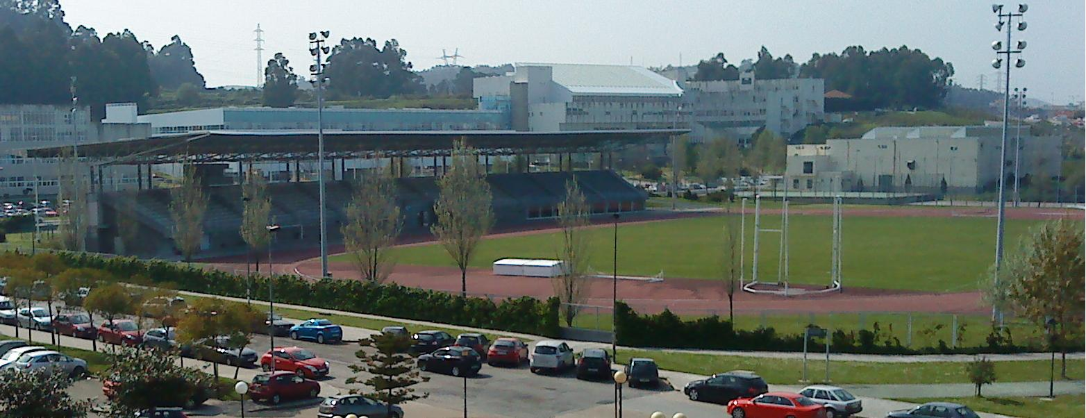 Estadio universitario, La Coruña, España.